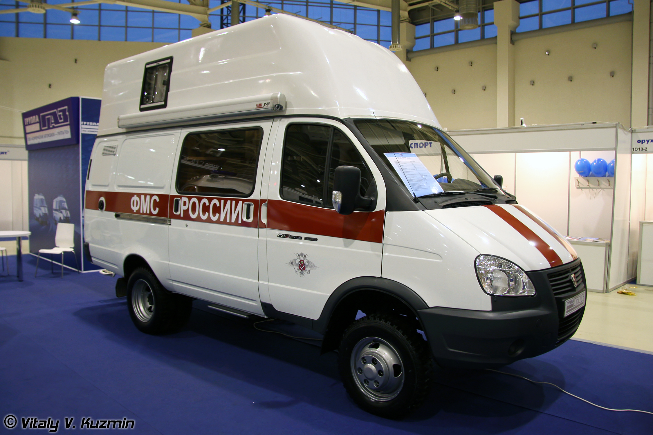 Передвижной пункт ФМС России, в увеличенном салоне располагается комната для приема заявителей и совершения различных регистрационных действий. (Federal Migration Service vehicle)